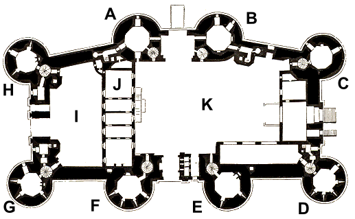 ...Dès le temps du roi Jean, ou même avant cette époque, il existait à l'entrée de la rue Saint-Antoine une porte flanquée de deux hautes tours; Charles V résolut de faire de cette porte une forte bastide. Vers 1369, ce prince donna ordre à Hugues Aubriot, prévôt de Paris, d'ajouter à ces deux tours un ouvrage considérable, composé de six autres tours reliées entre elles par d'épaisses courtines...